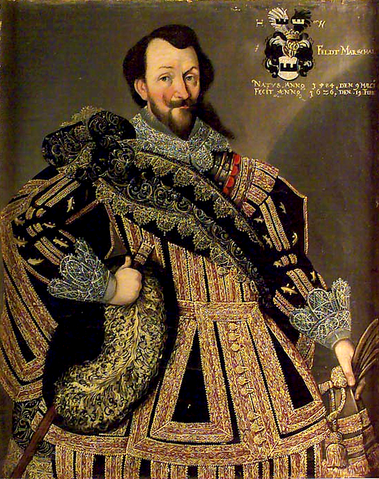 Herman von Wrangel (1585–1643)